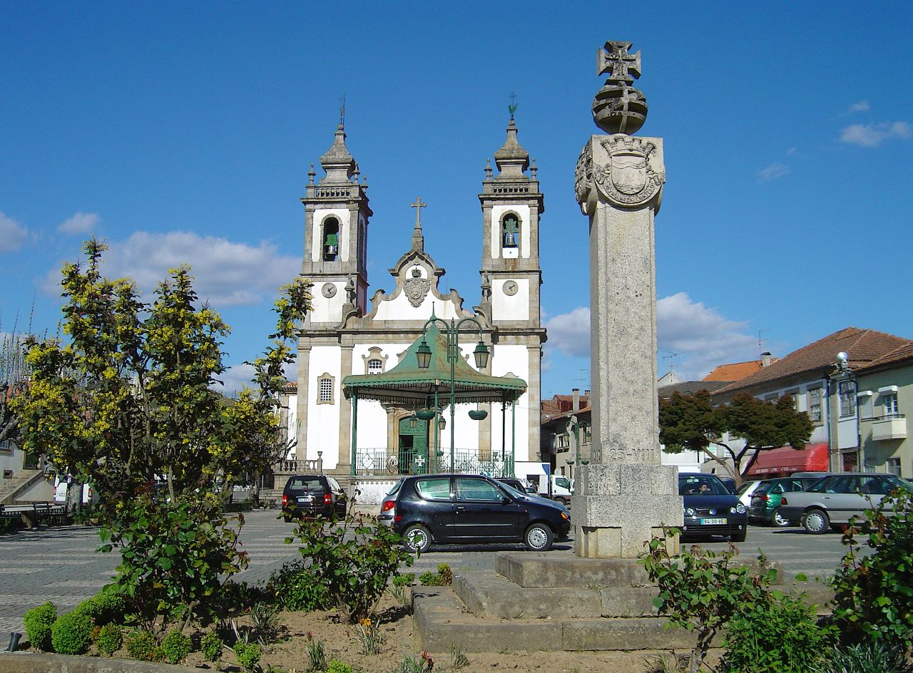 Igreja matriz de Penalva do Castelo - Portugal